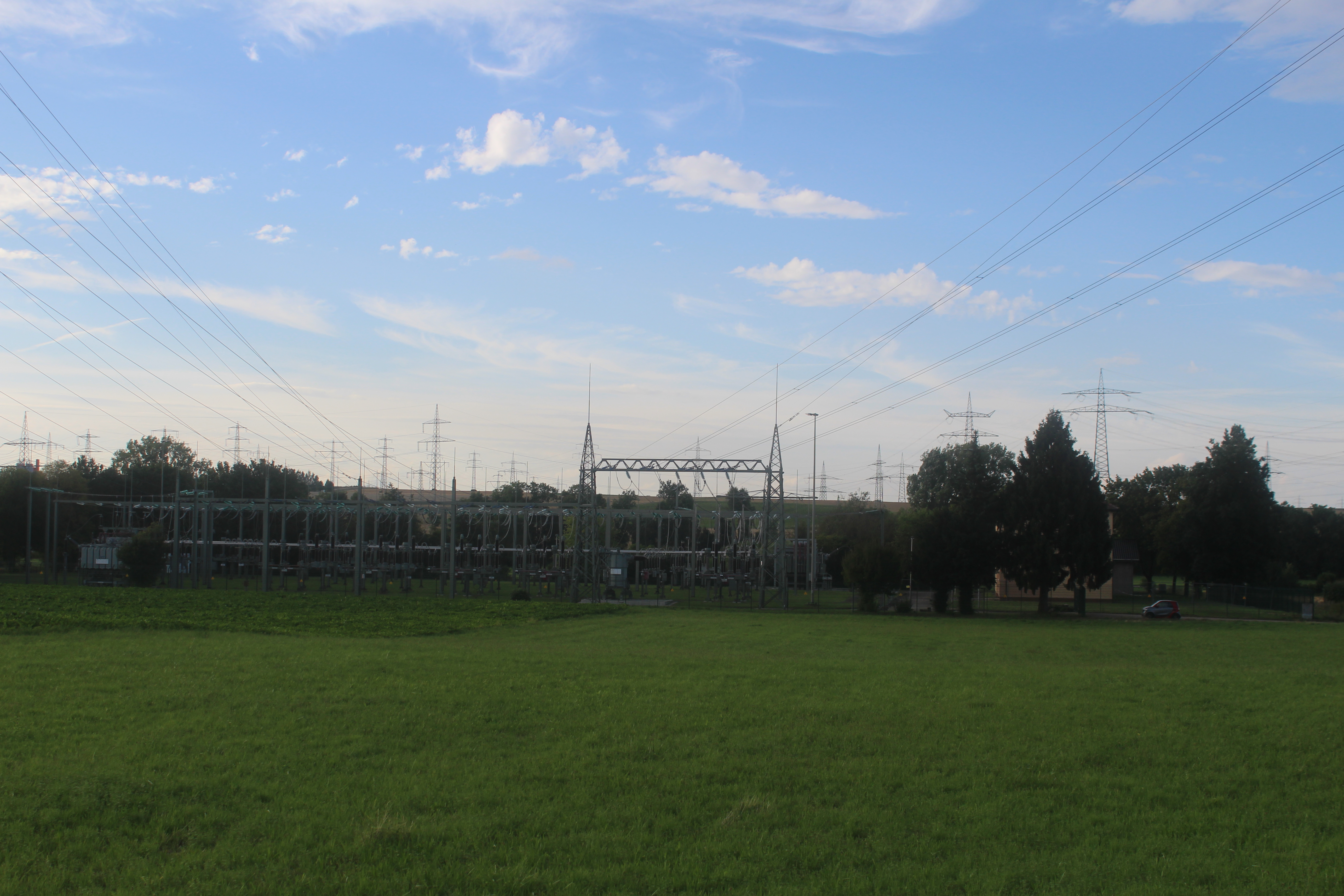 Süwag-Umspannwerk Grossgartach